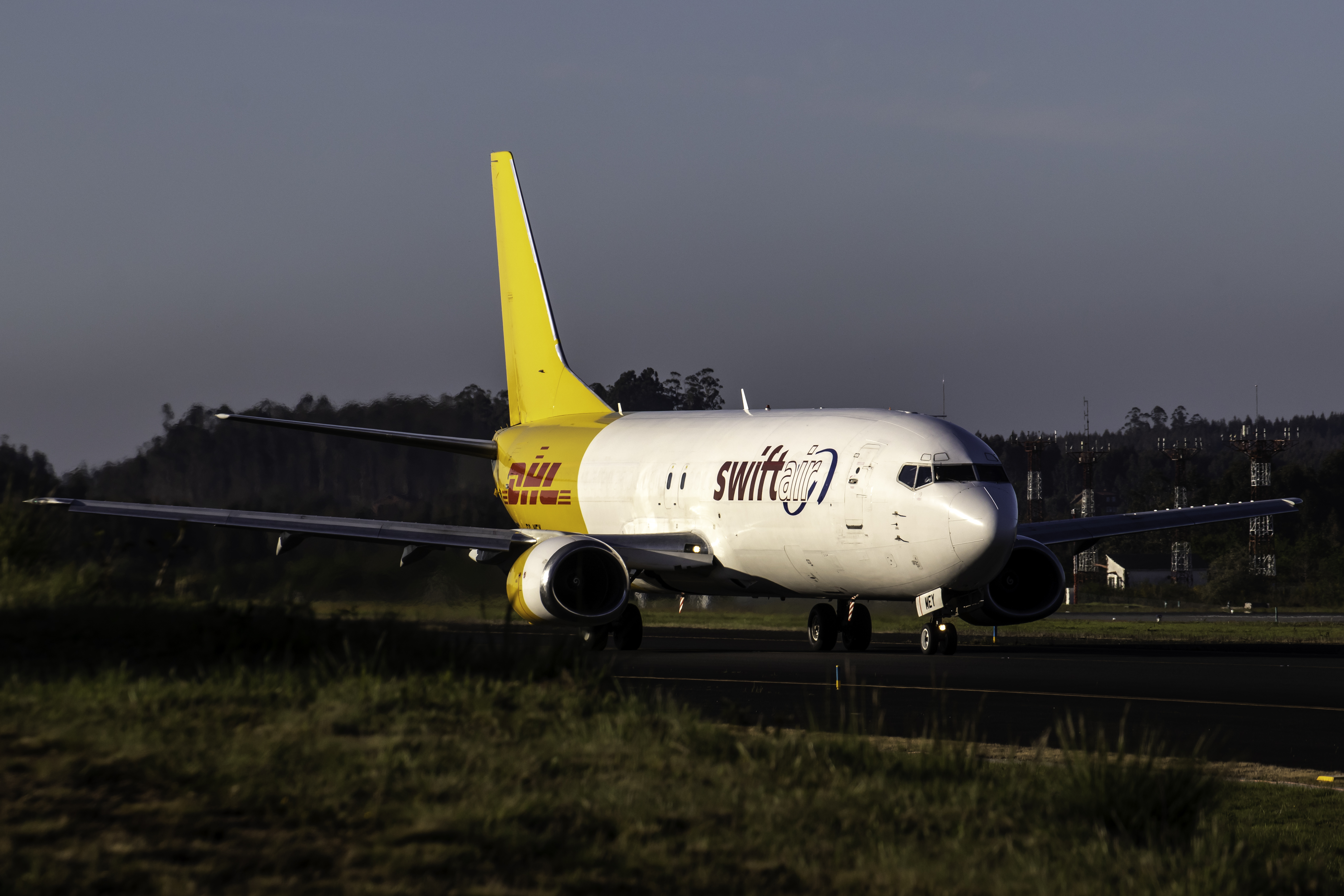 Boeing 737 de Swiftair rodando antes de engalar do aeroporto de Santiago de Compostela.